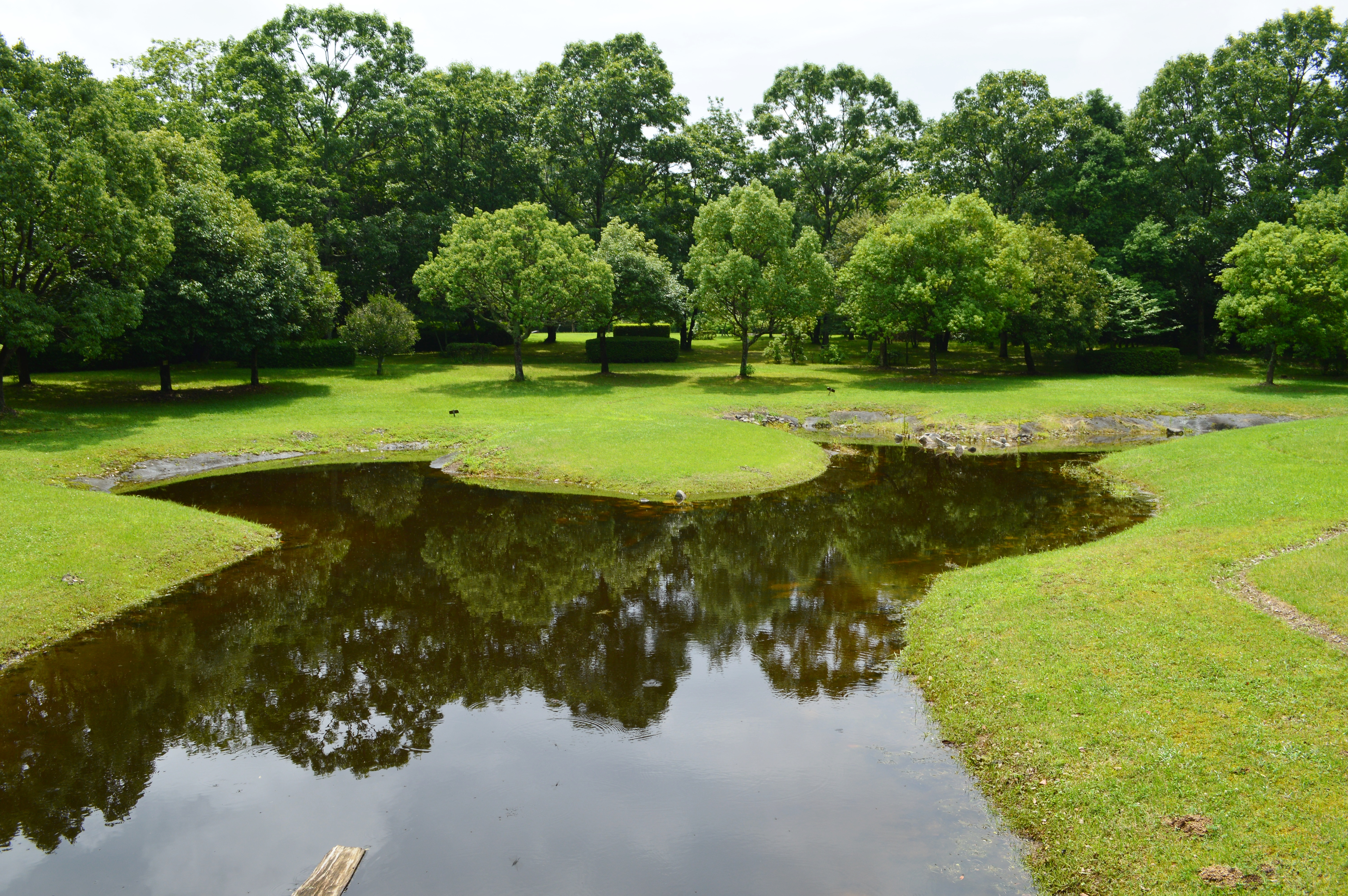 城之越遺跡 概観 Nikon D3200